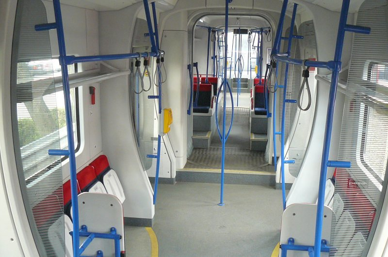 Wnętrze elektrycznego zespołu trakcyjnego EN97-007.